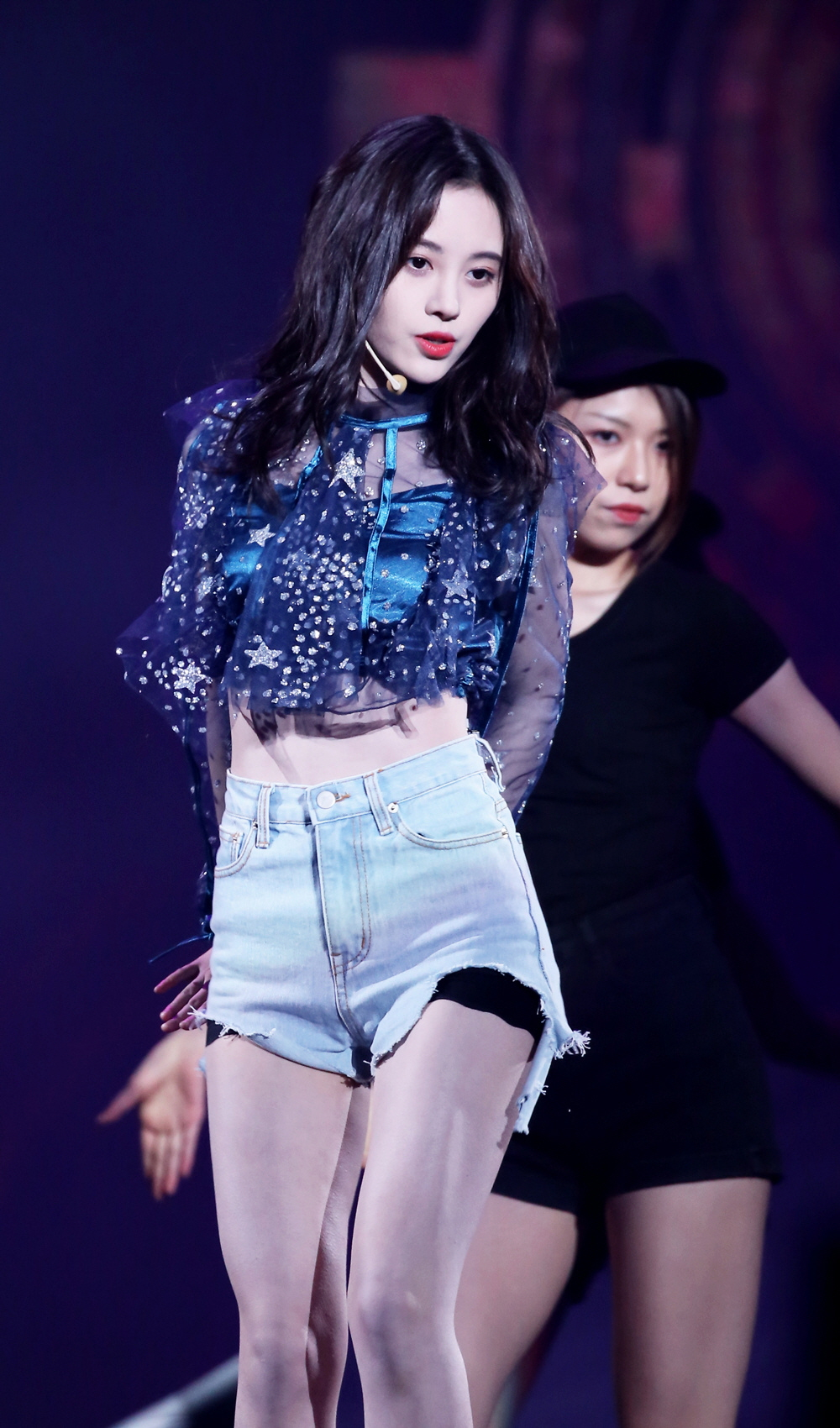 咪咕音乐盛典